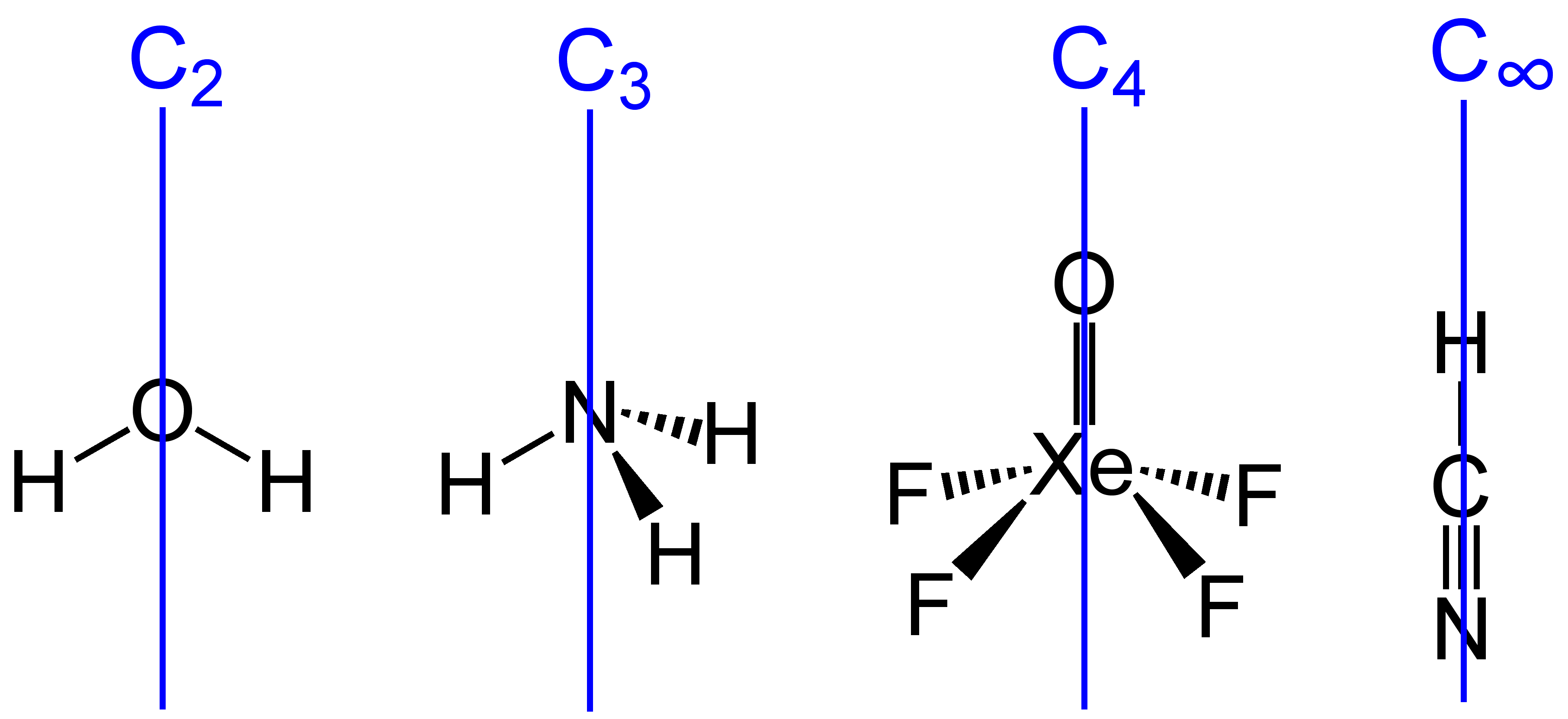 Drehachsen